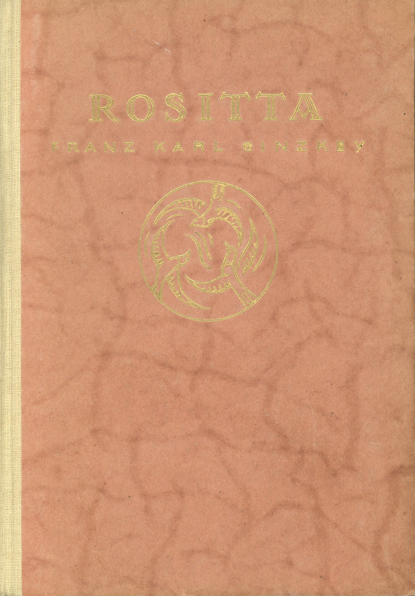 Franz Karl Ginzkey: Rositta. L. Staackmann, Leipzig 1921